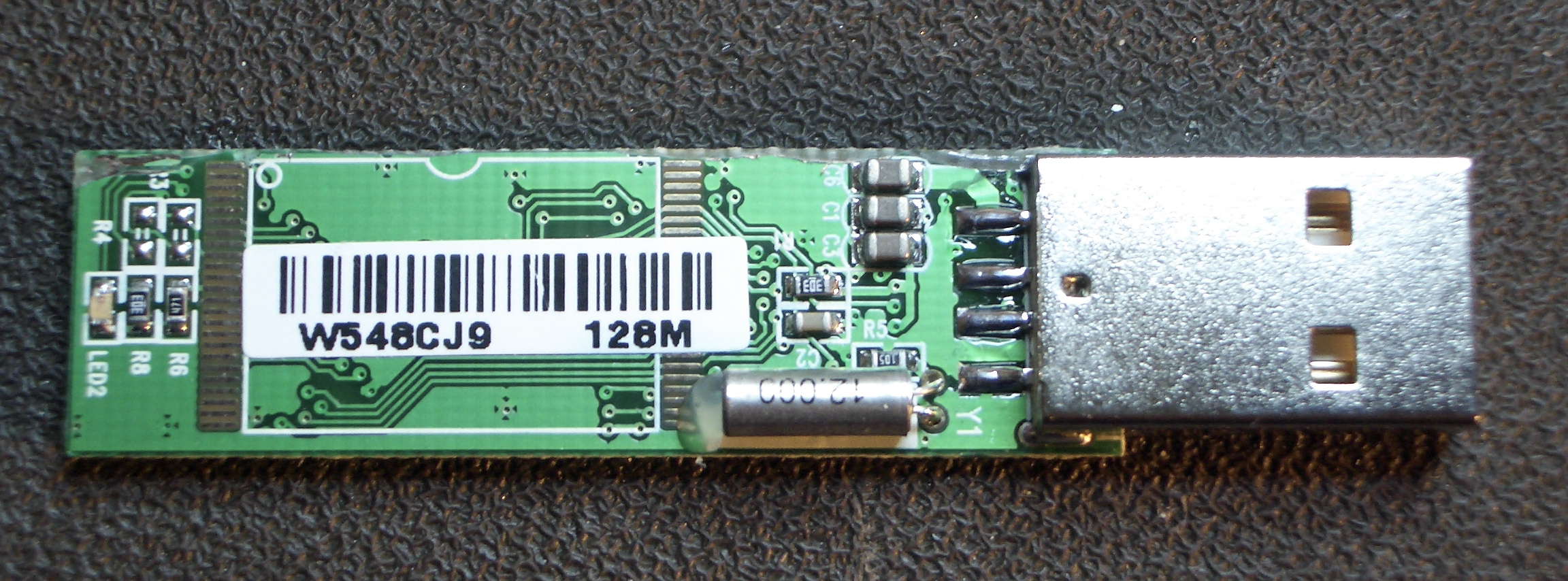 Memoria USB 128MB